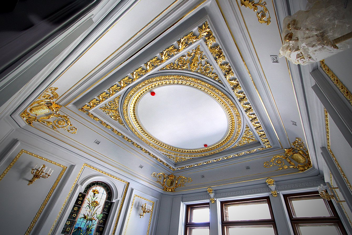 Отреставрированный потолок одного из залов особняка Коробкова в Москве на Пятницкой улице, 33-35.